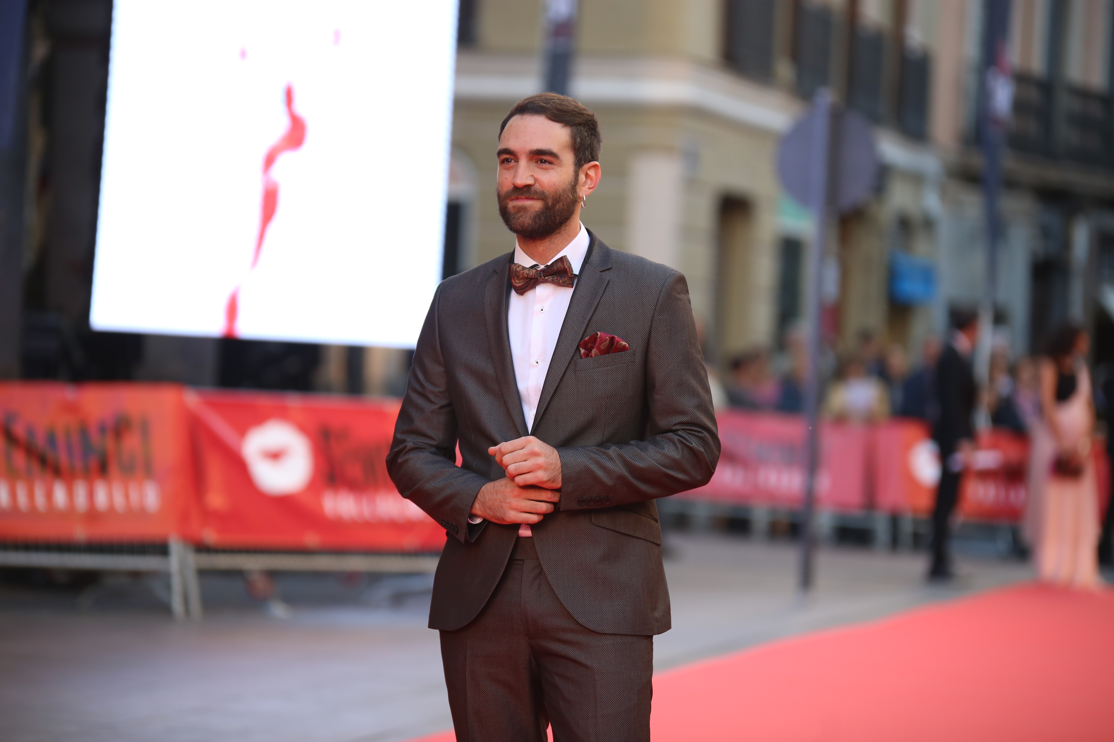 Seminci 2016